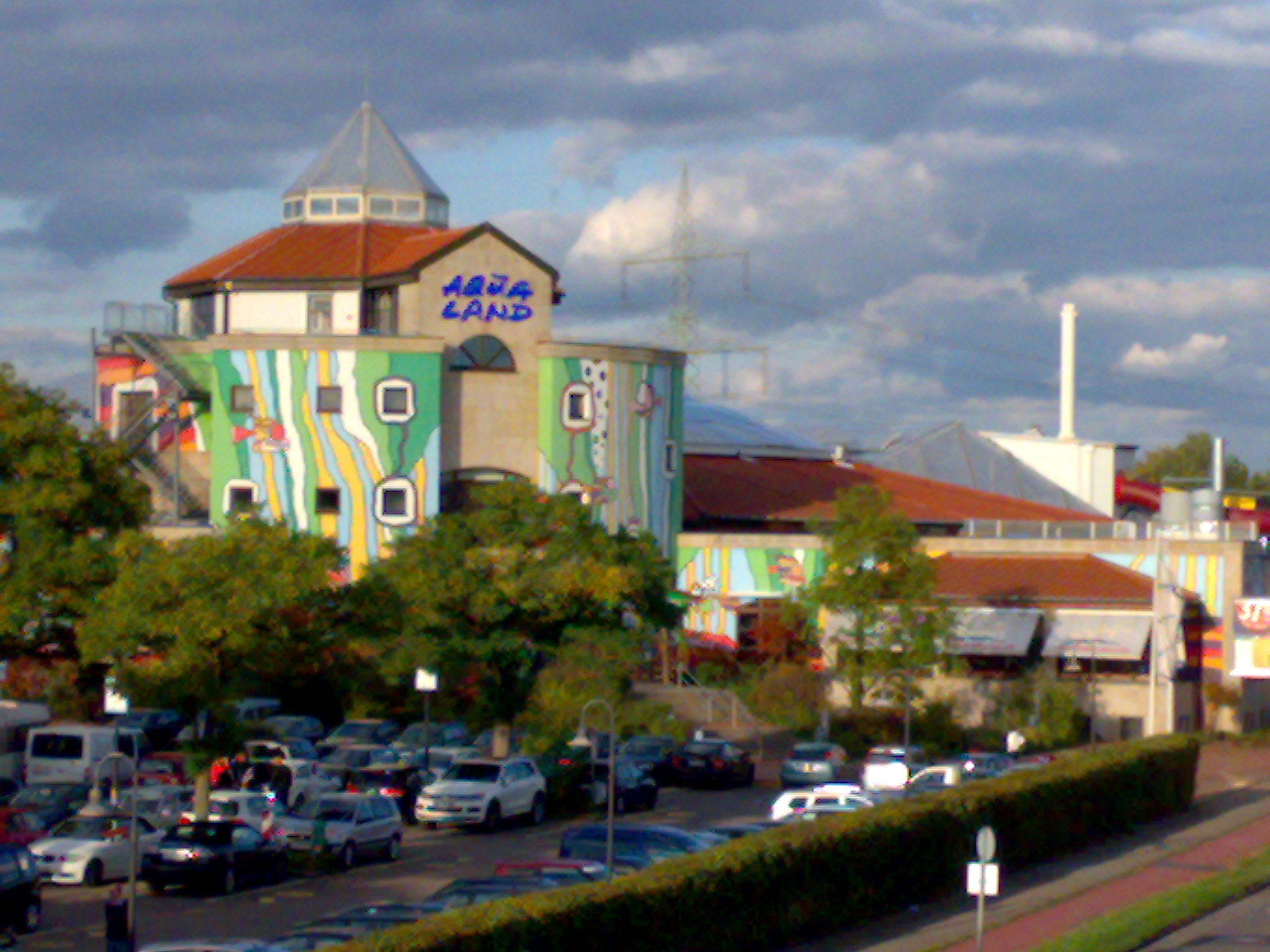 Blick von der Merianstraße